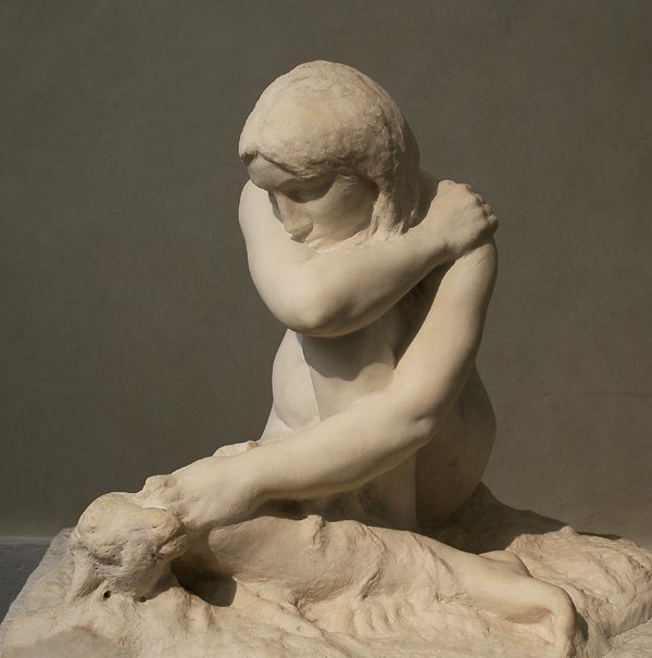 Jean-Alexandre Pézieux (1850-1898), L'Émotion, 1898, groupe en marbre, musée des beaux-arts de Lyon.